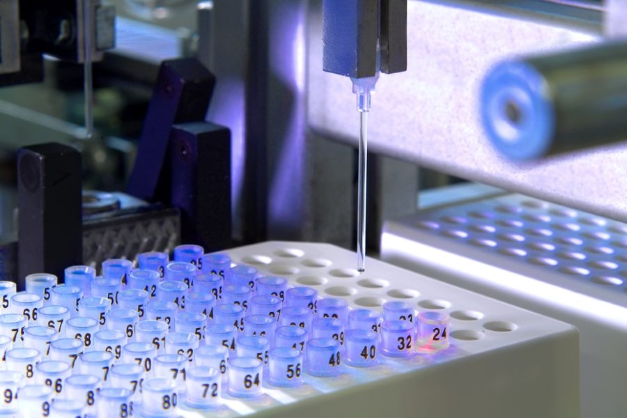 Thermocycler, Geschäftsfeld Medizintechnik